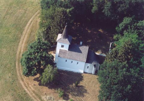 Böde, Hungary, aerial photography. Szent Mihály római katolikus templom